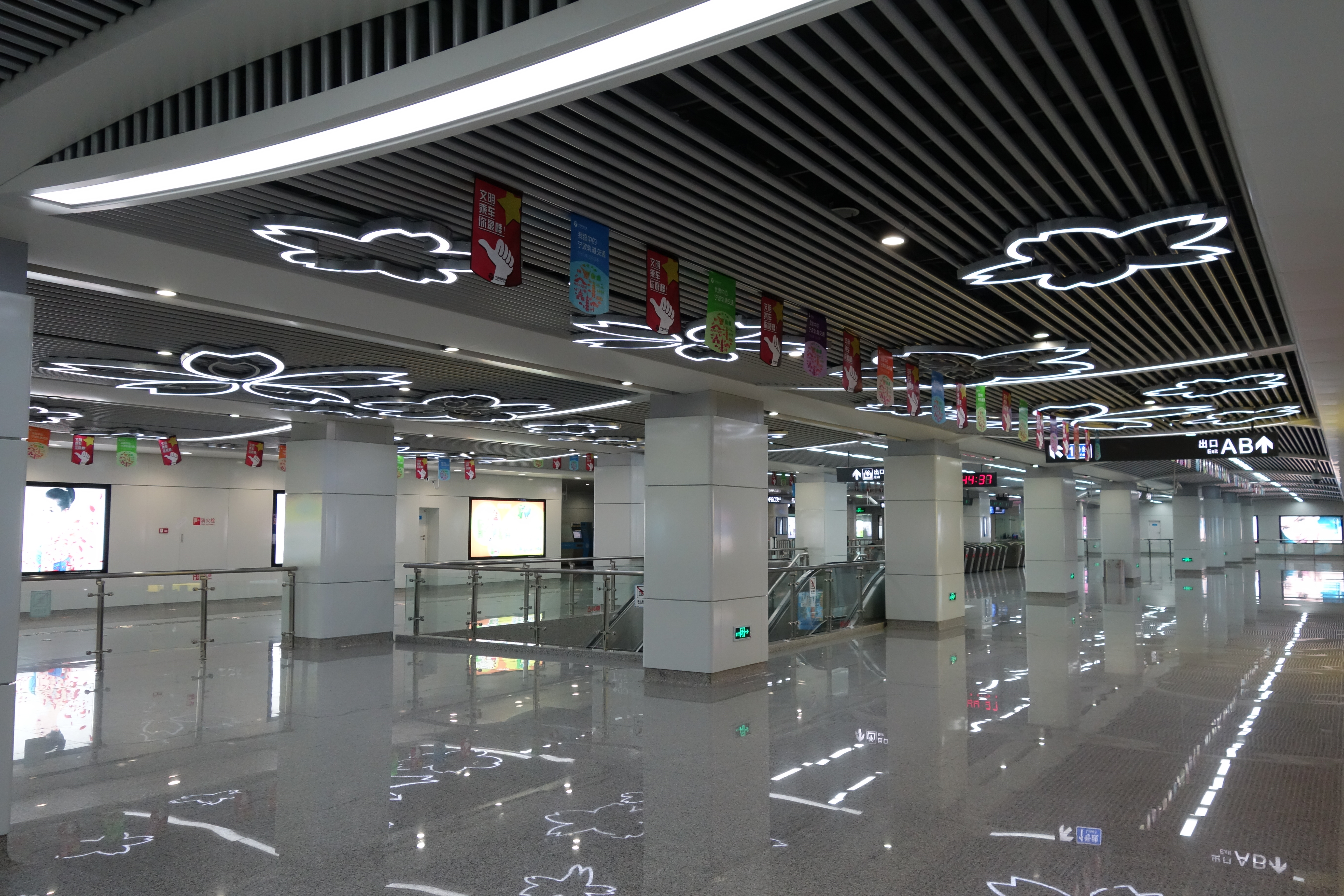 樱花公园站站厅